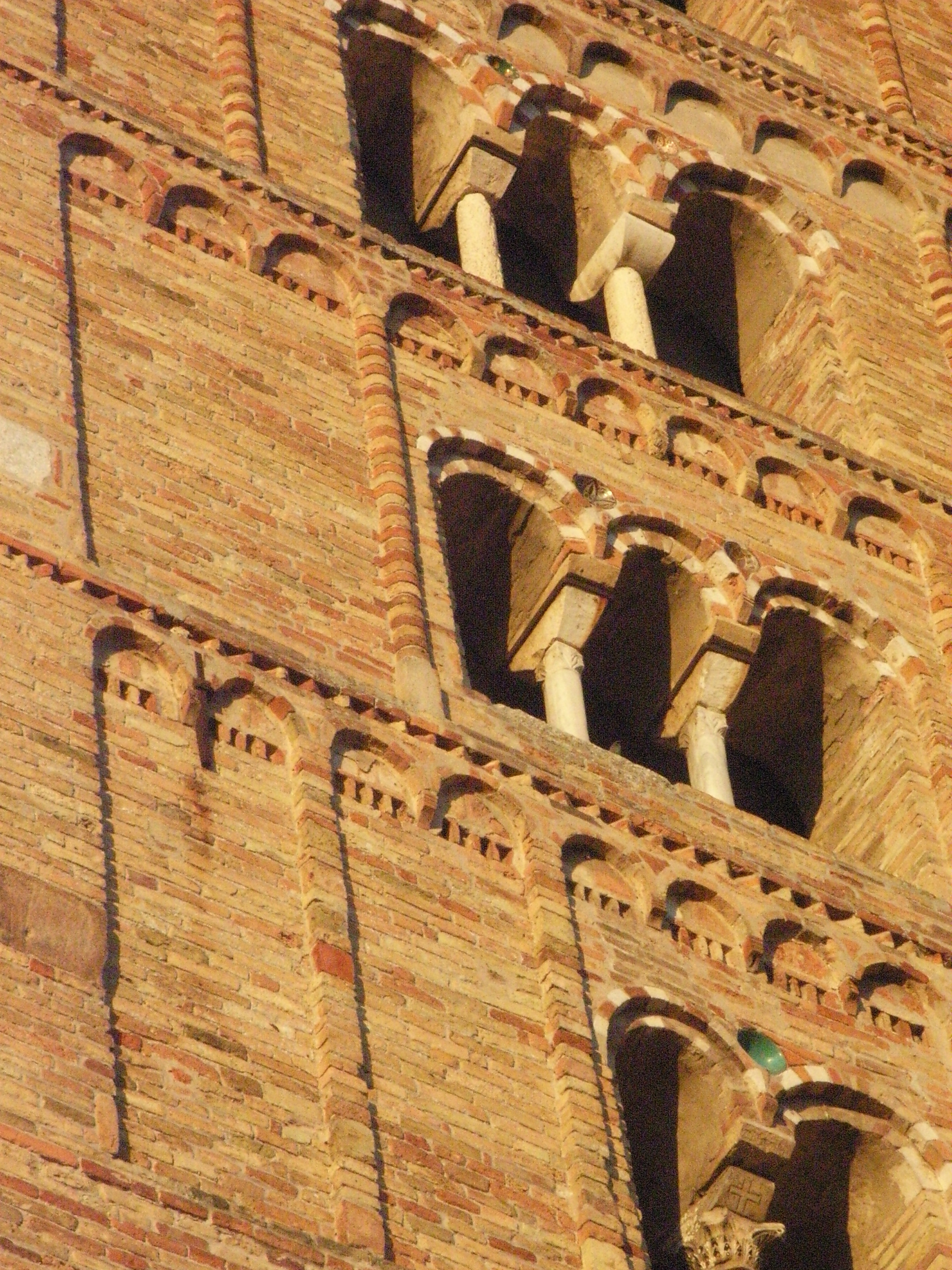 Dettaglio Campanile Abbazia di Pomposa